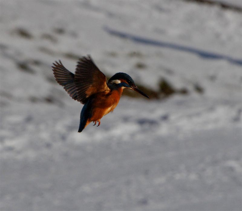 Eisvogel (Alcedo atthis) auf der Jagd über einem Wasserloch im Rüttelflug